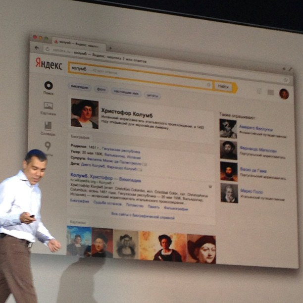 Илья Сегалович презентует новую выдачу Яндекса «Острова»